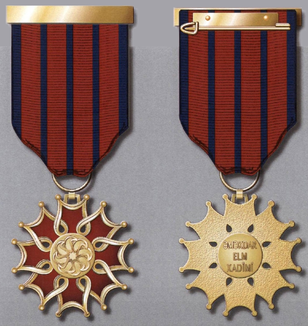 “Əməkdar elm xadimi” fəxri adının döş nişanı